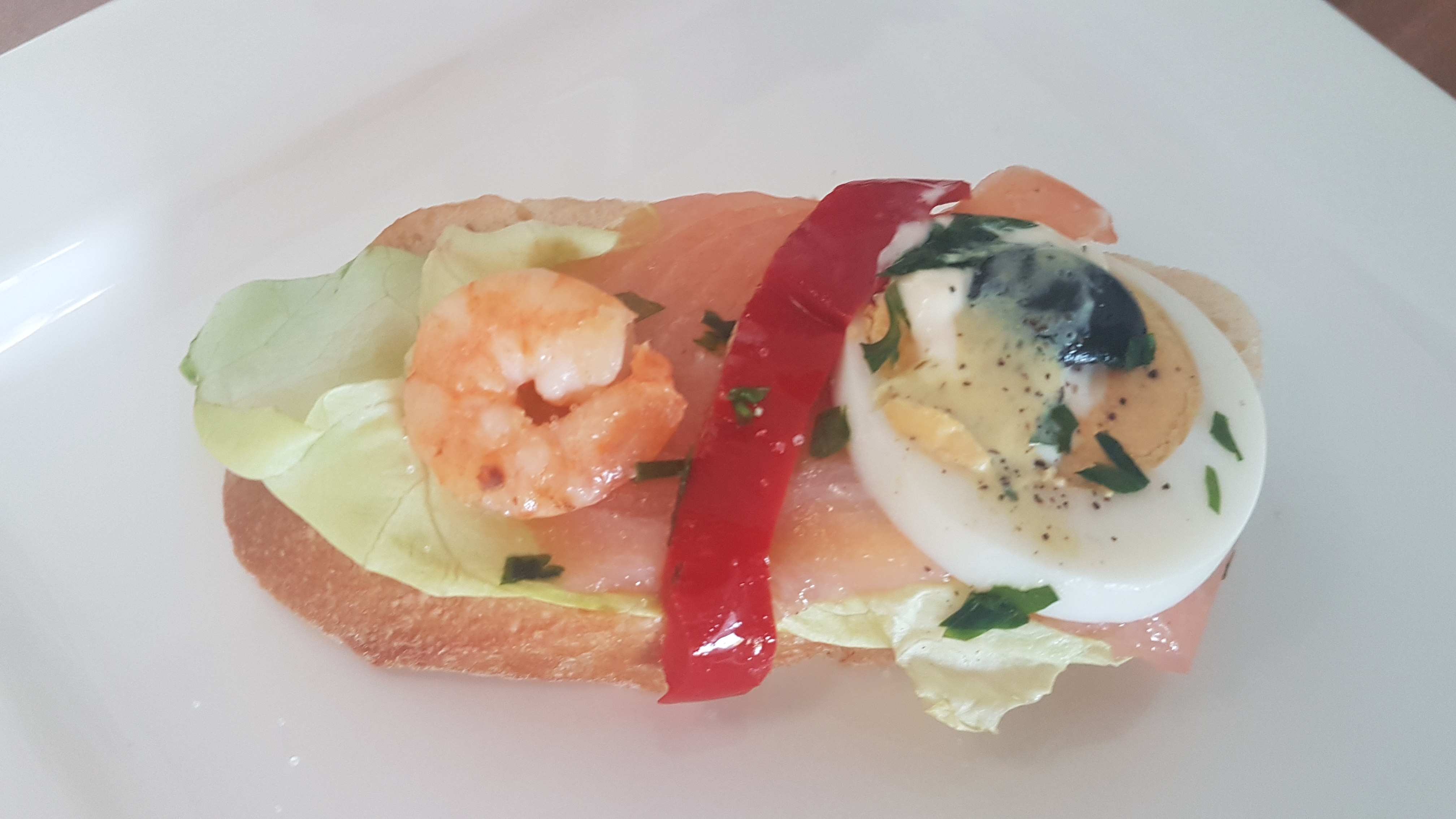 Appetithäppchen - Eine Baguettscheibe mit Salat, Lachs, Garnelen, Oliven, Ei, Paprika, Soße, Kräutern und Gewürzen. Aufgenommen in Tauberbischofsheim, Main-Tauber-Kreis, Baden-Württemberg, Deutschland.